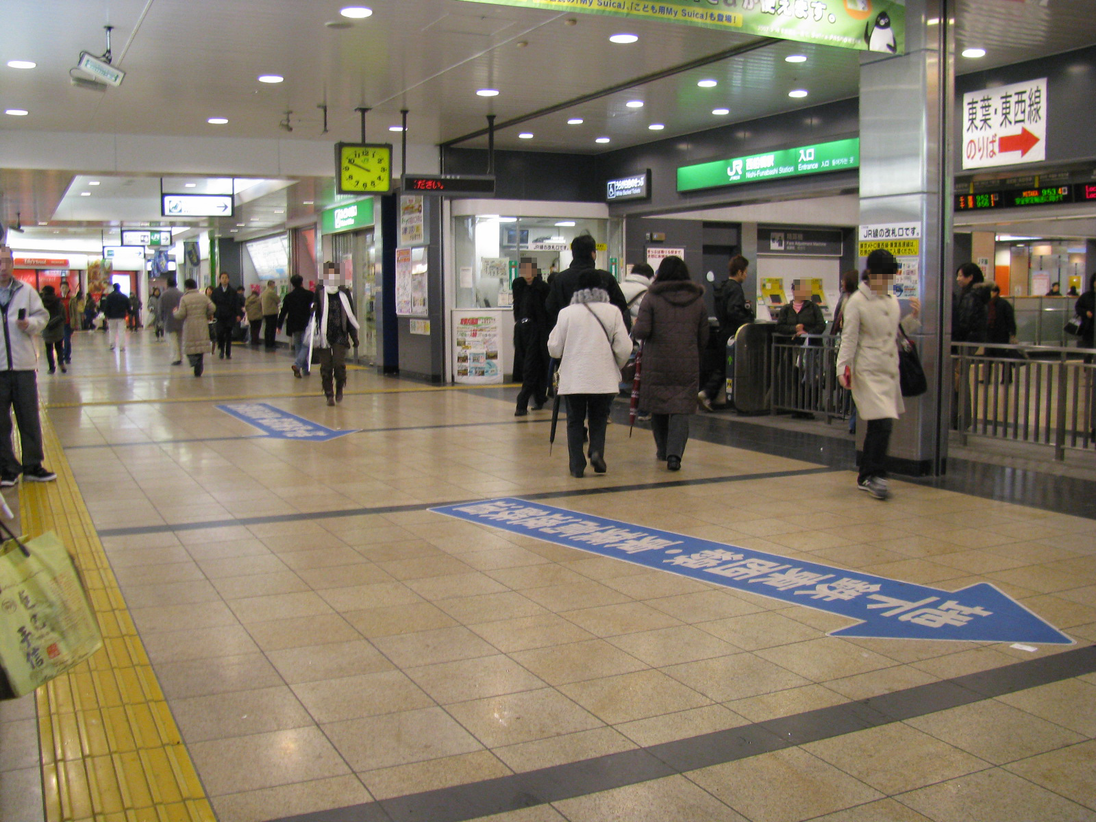 JR西船橋駅